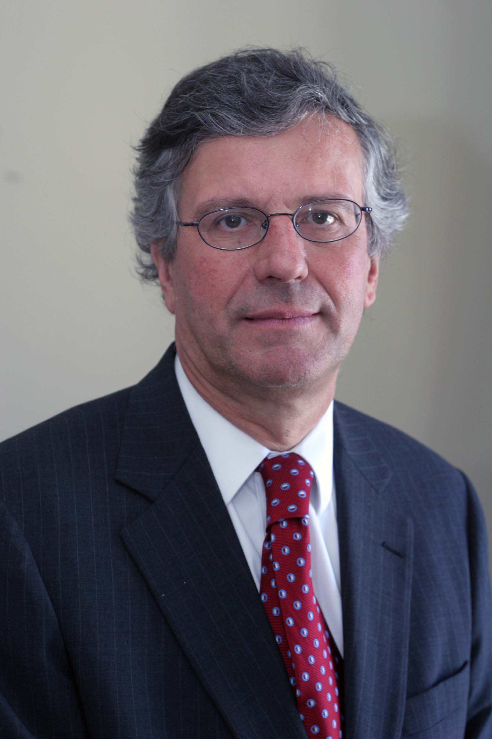 Fernando Echeverría, ingeniero chileno.